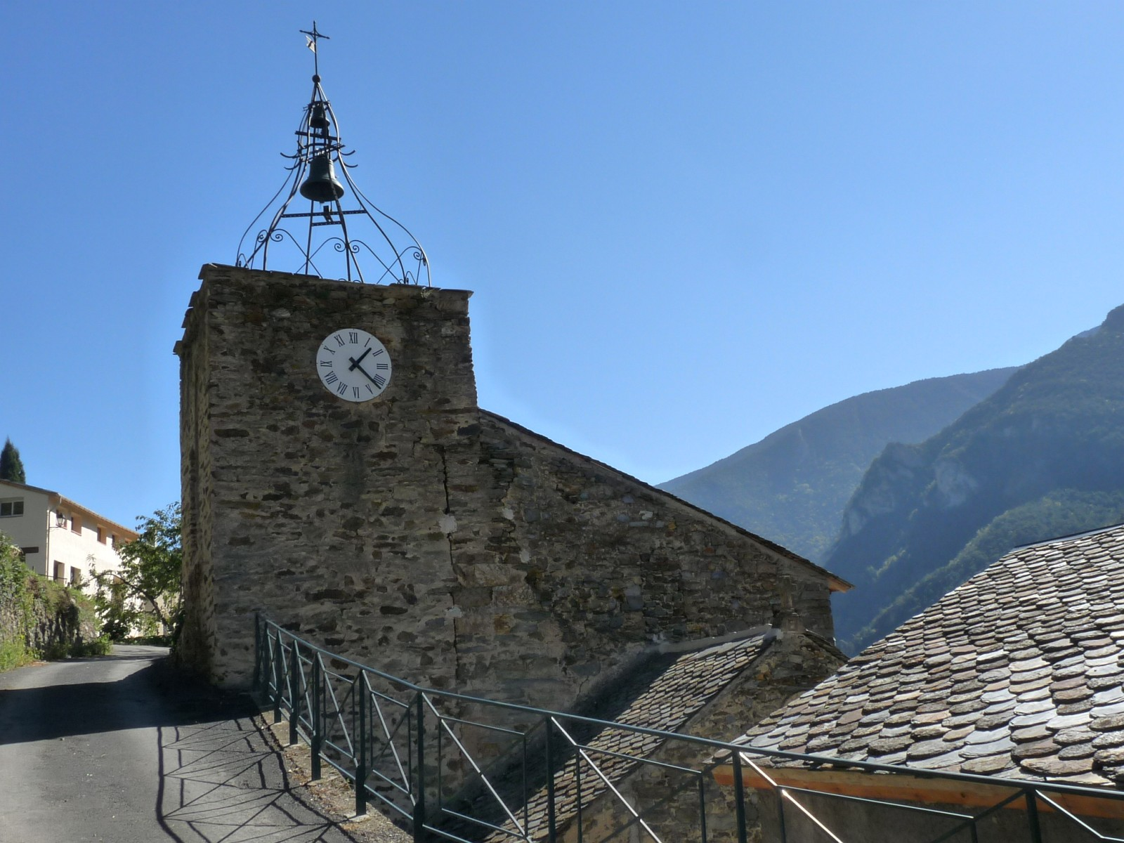 Eglise de Nohèdes, Pyrénées-Orientales, France